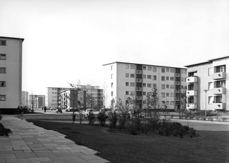 Oktober 1960 Bremen-Vahr Sozialer Wohnungsbau